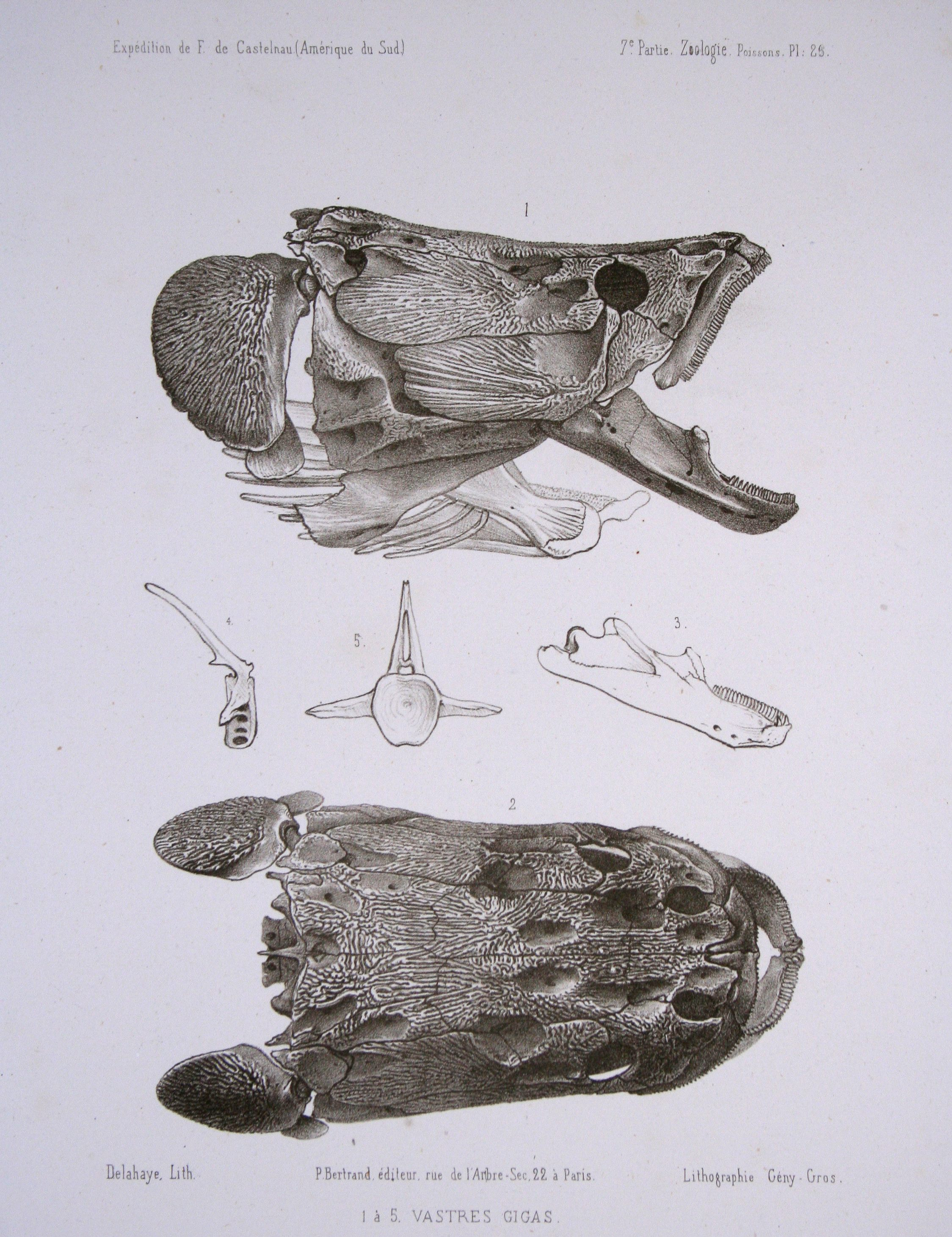 Vastres gigas = Arapaima gigas 1: skull, side 2: skull, top 3: lower jaw, side 4: vertebra, side 5: vertebra, front